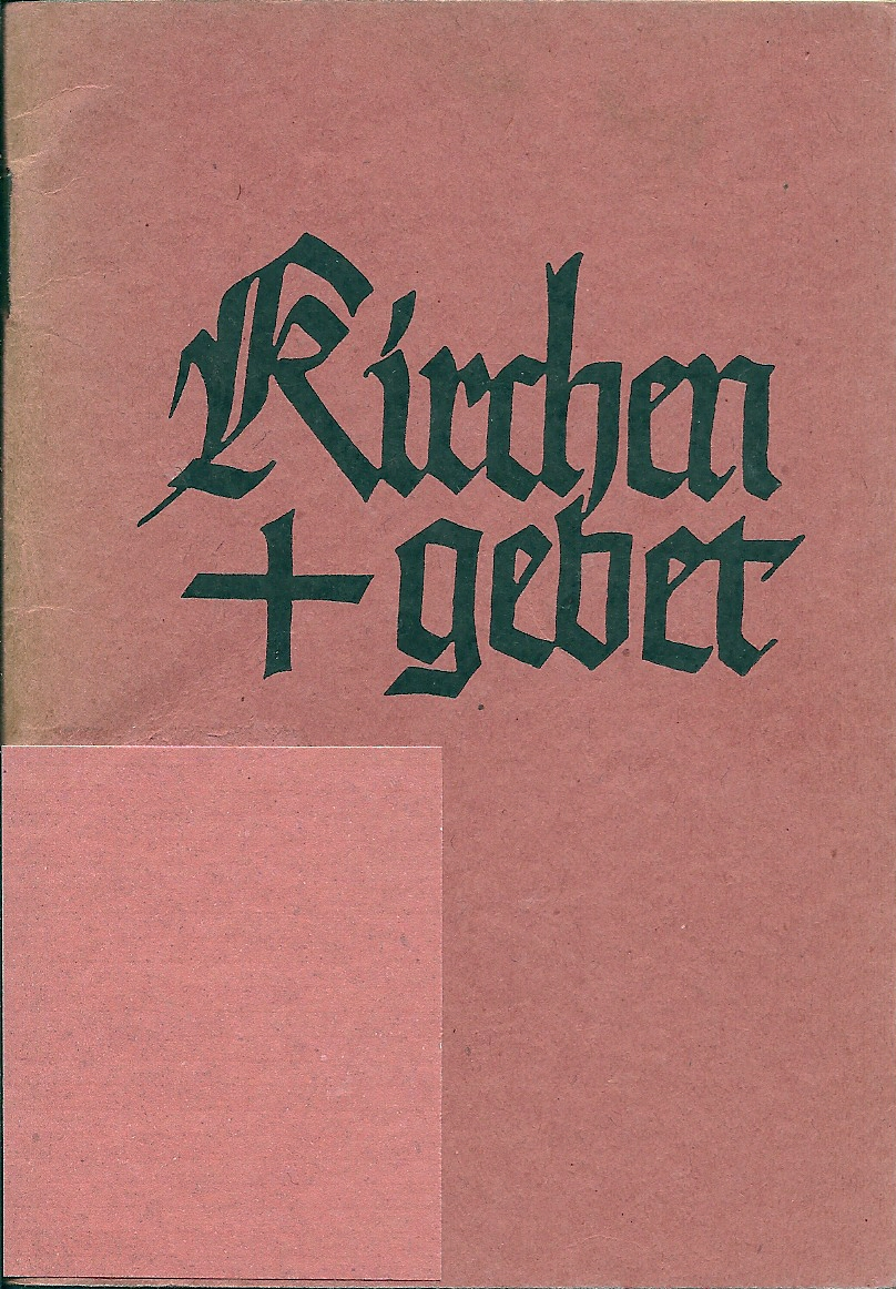 Kirchengebet für den Gemeinschaftsgottesdienst, Christophorus-Verlag Freiburg (Breisgau) 1949, Titelseite